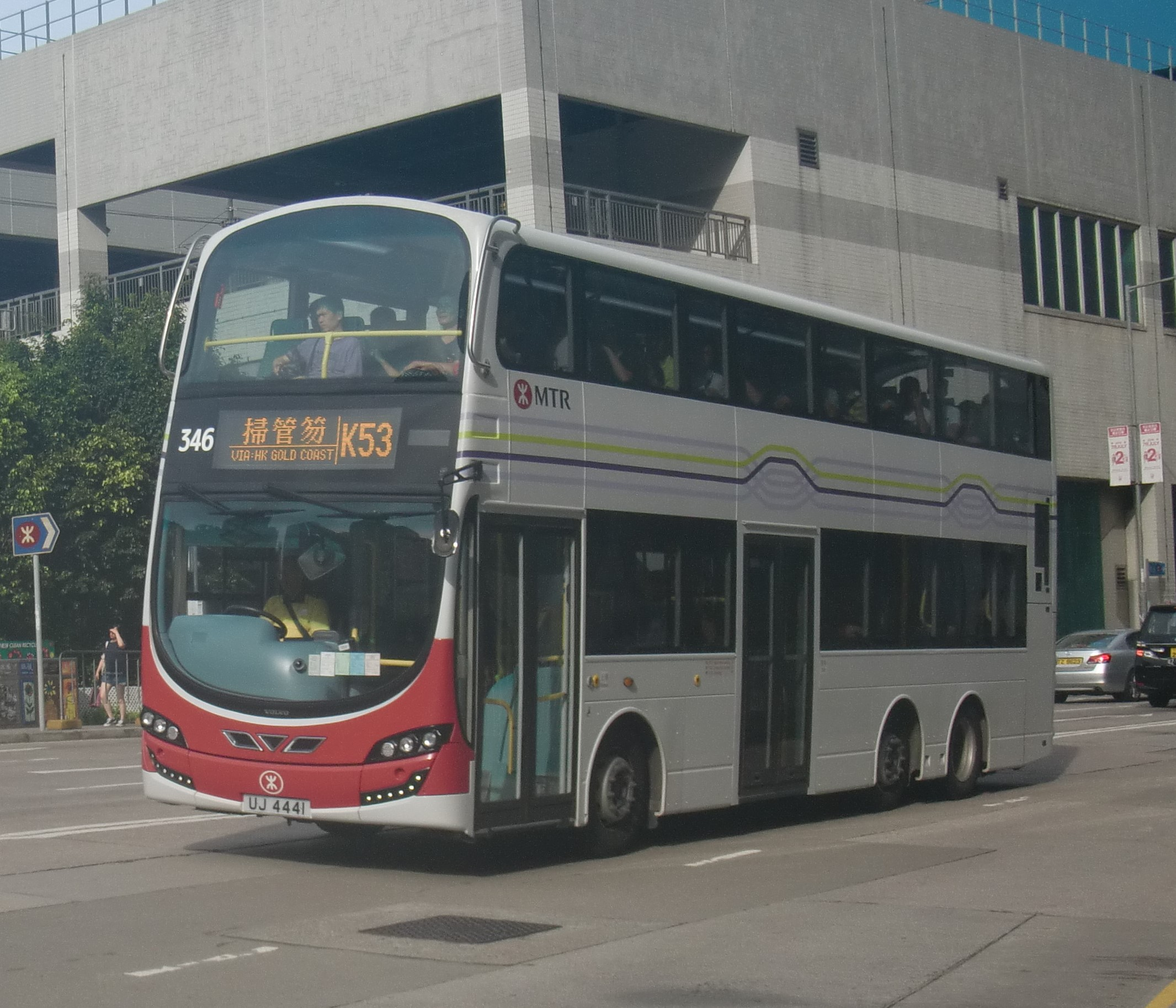 中文（香港）: 港鐵巴士K53線，剛駛出屯門站